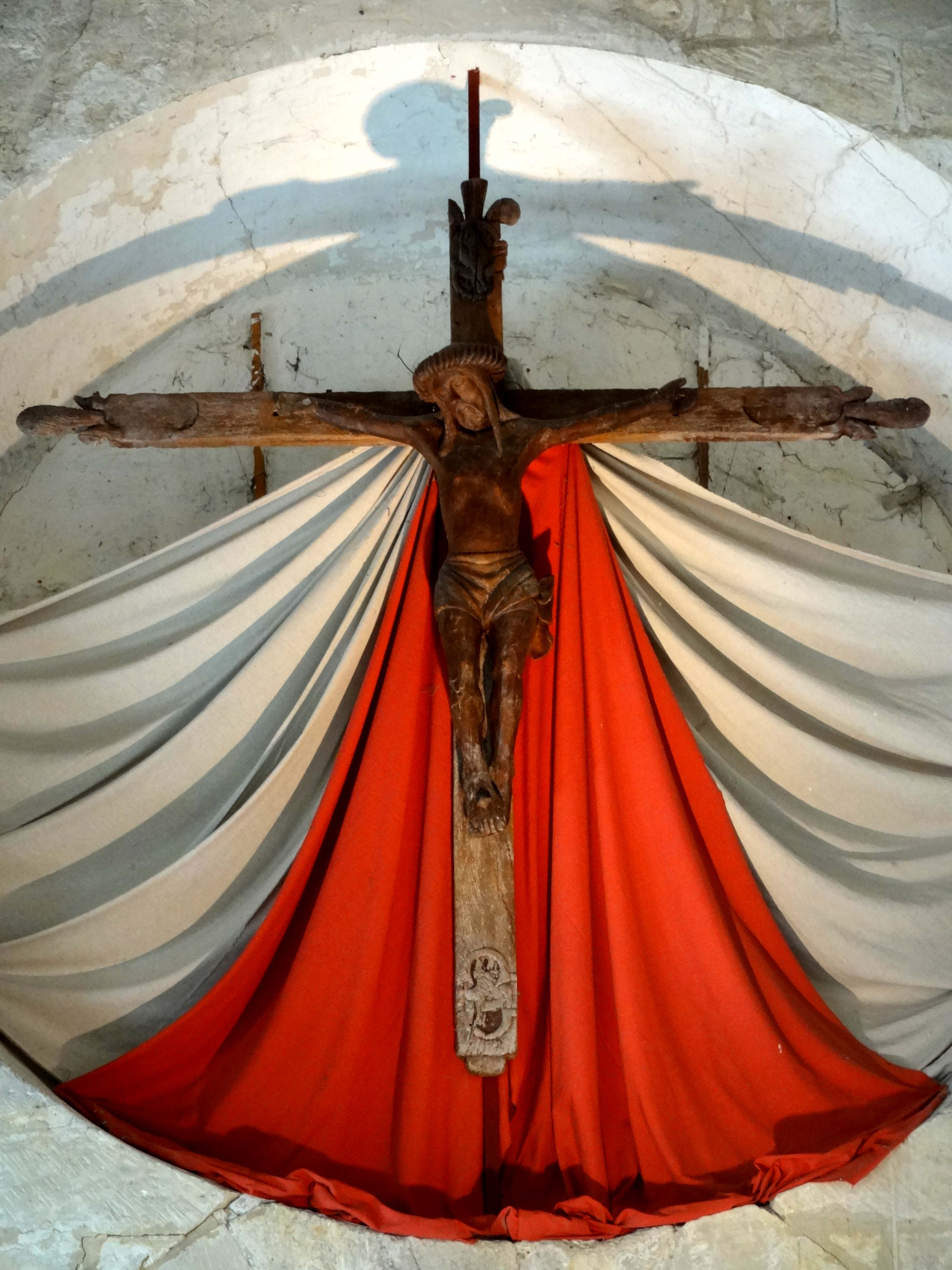 Mobilier de l'église - voir titre.